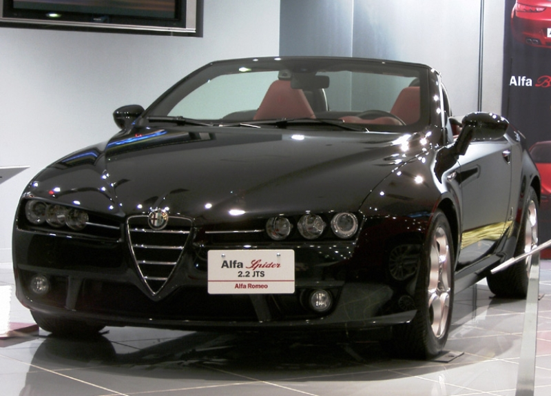 Alfa Spider Alfa Romeo Shinjuku park